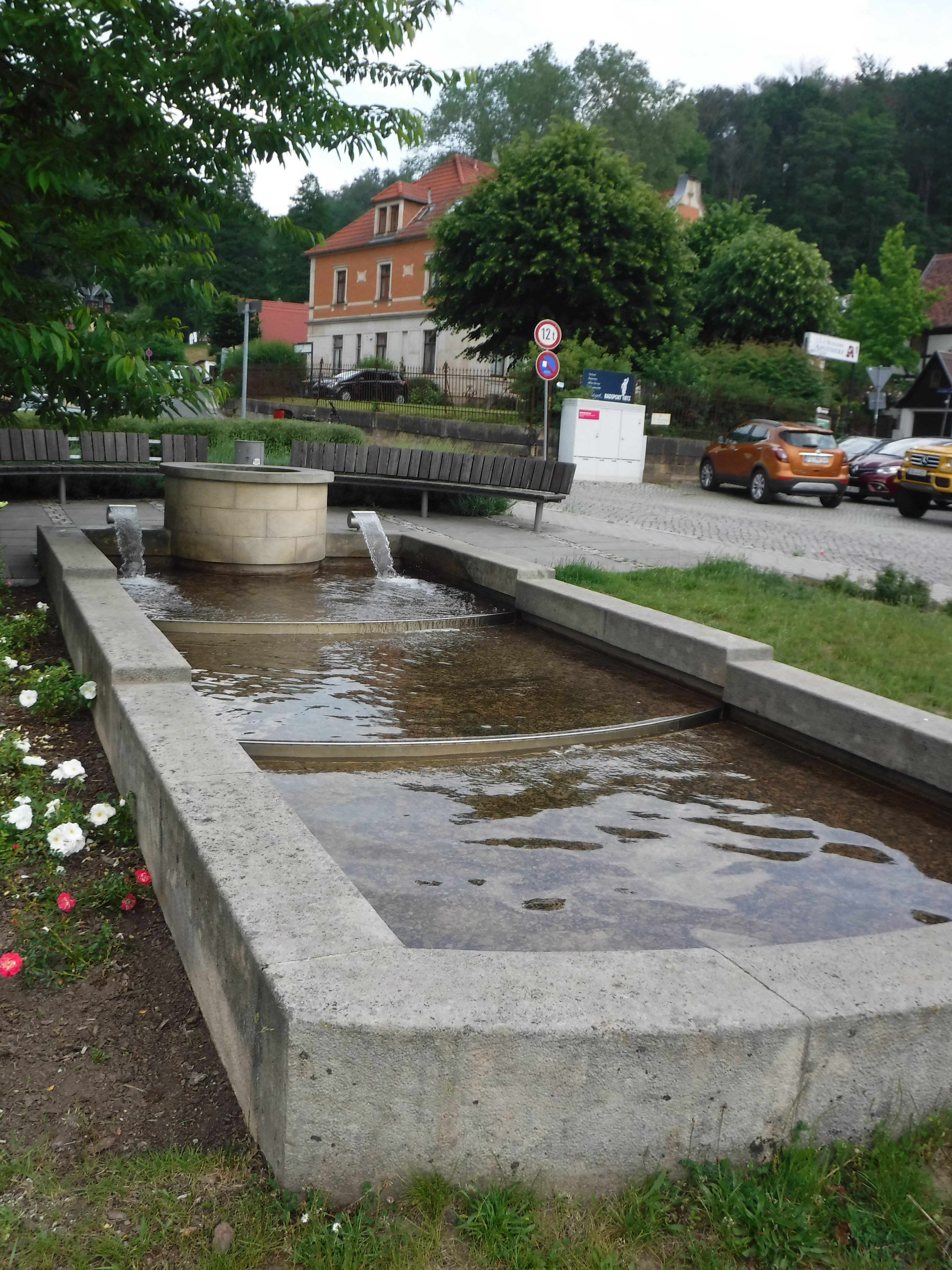 Der Rathausbrunnen in Pillnitz. Grundlegend saniert 2007